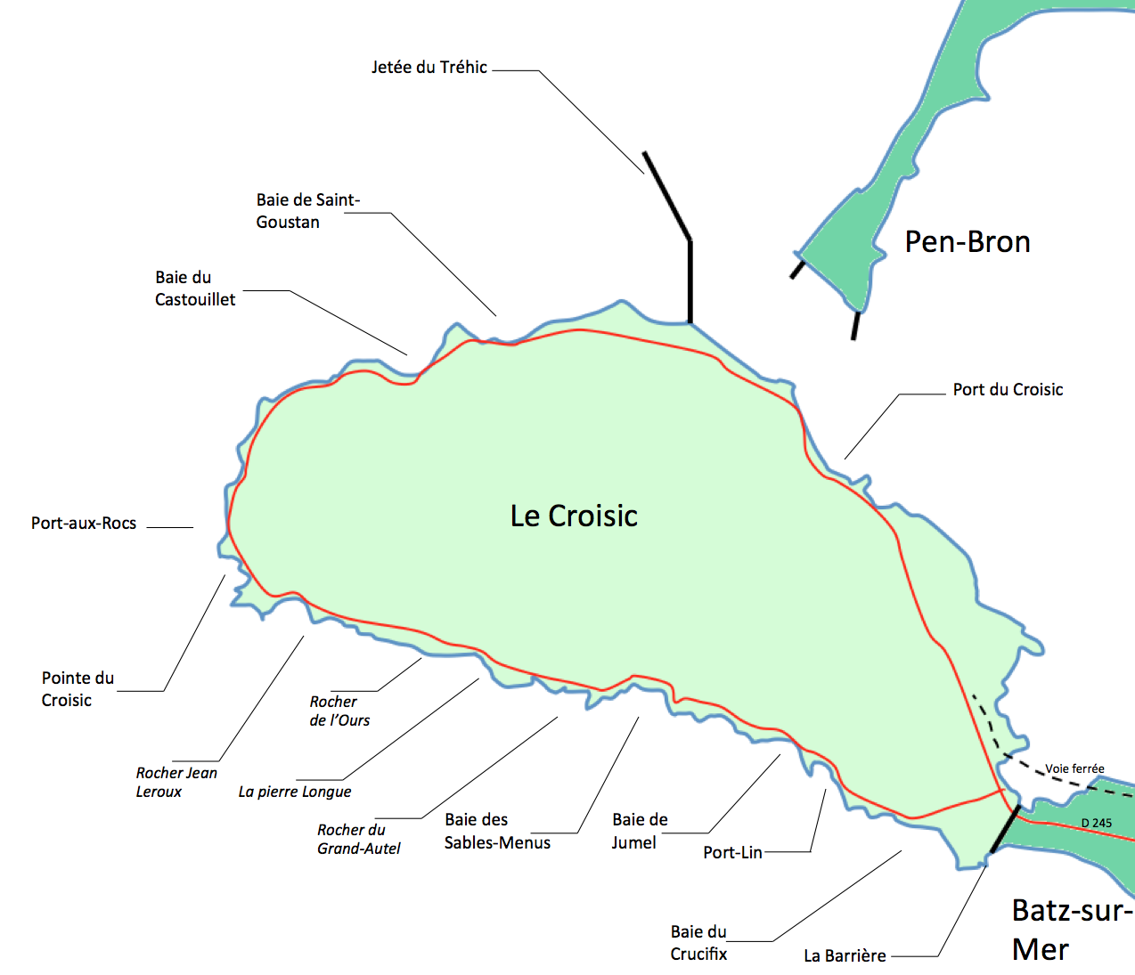 Description du littoral du Croisic